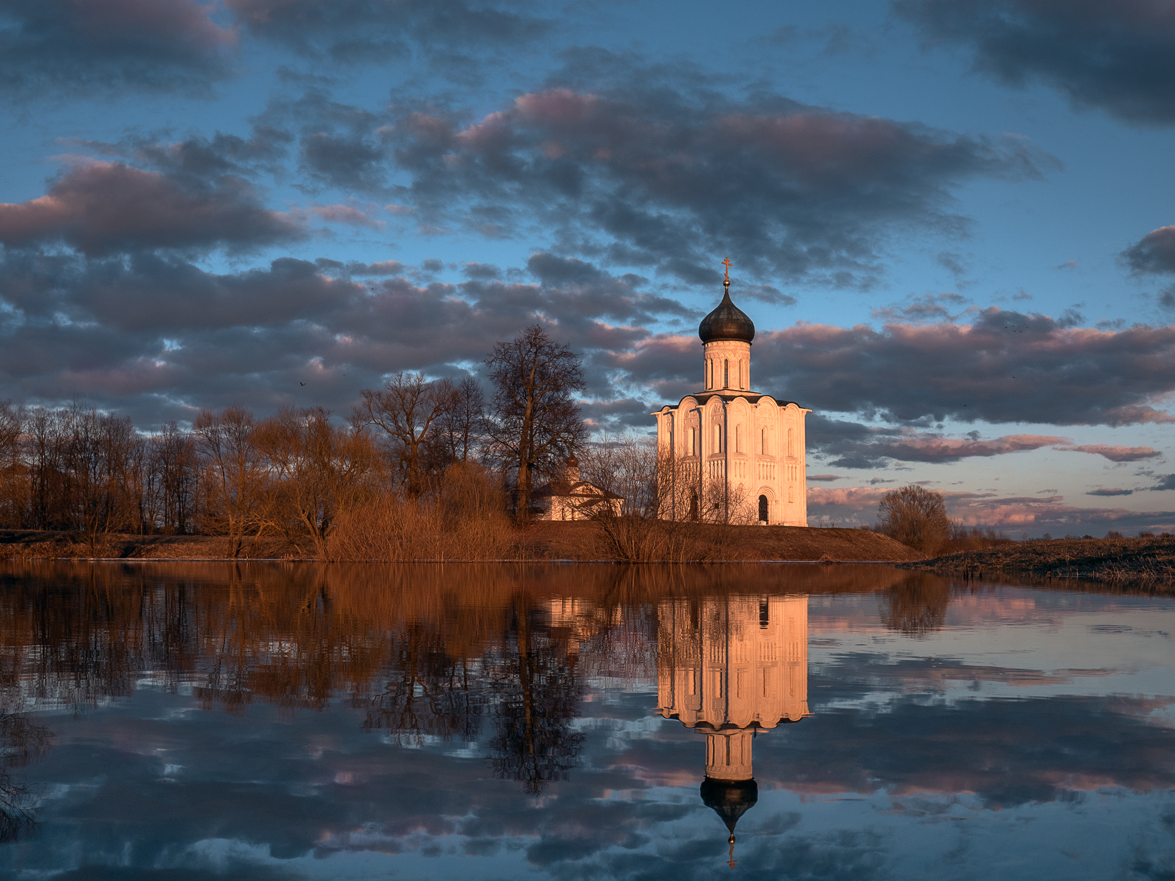 Церковь Покрова на Нерли: 1.5 км юго-восточнее поселка, правый берег реки Нерль, Боголюбово, Суздальский район, Владимирская область